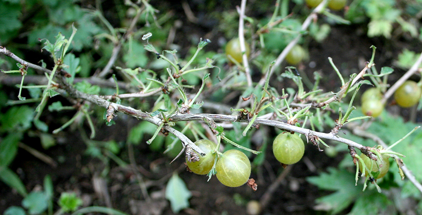 Skemdir á laufum Stikkillsberjarunna eftir Rifsþélu (Nematus ribesii)